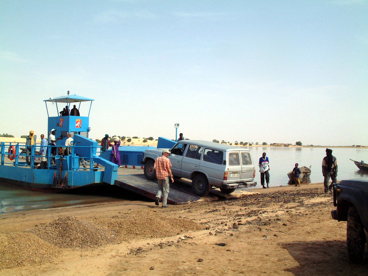 Tombouctou, le bac.